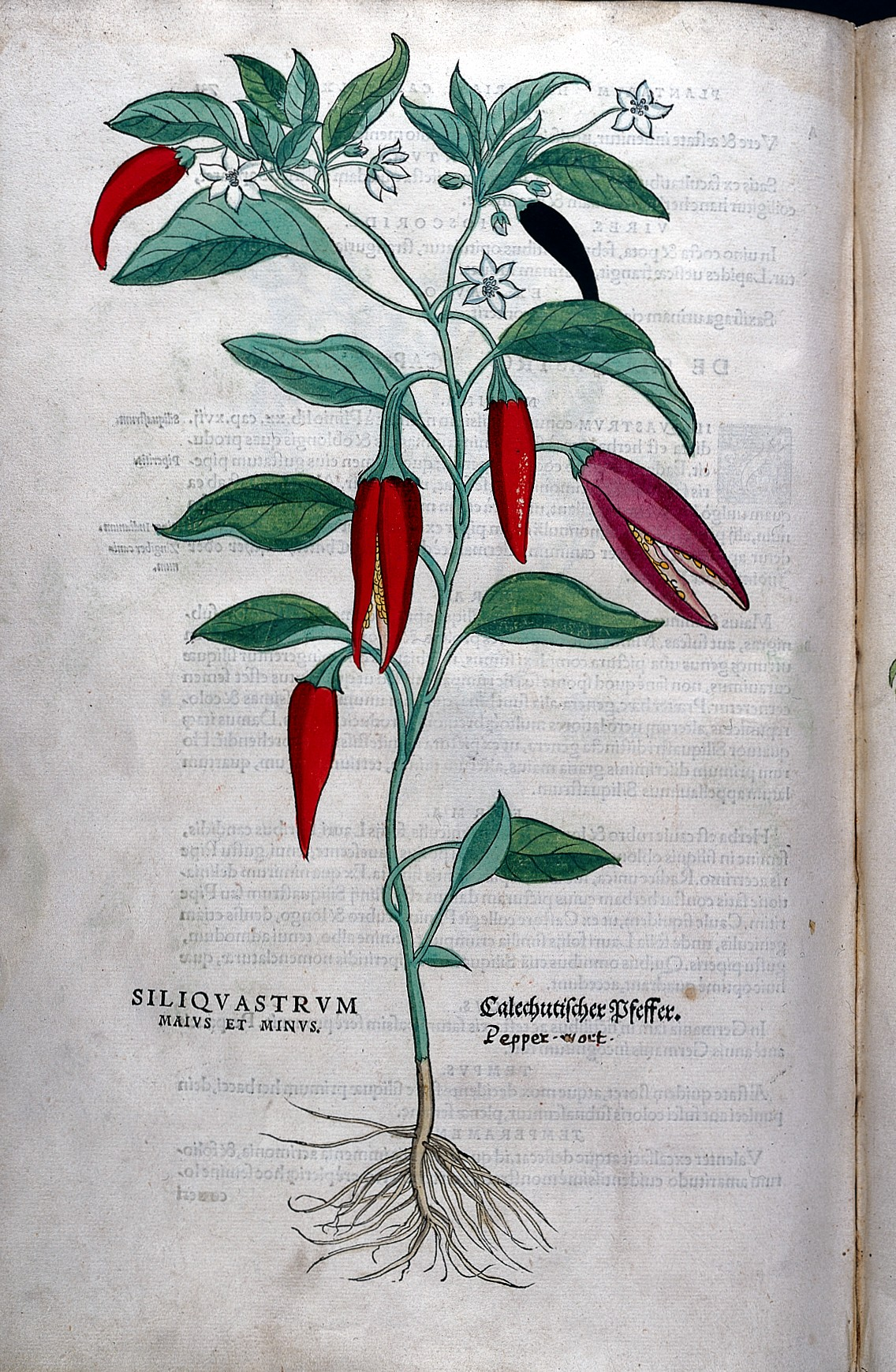 Siliquastrum majus et minus ('Pepper wort'). Rare Books